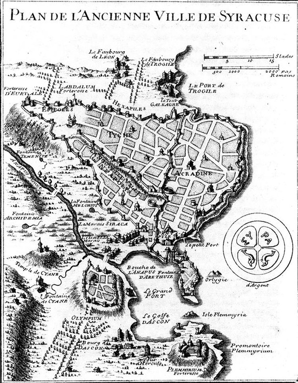 Descrizione luoghi greci siracusani